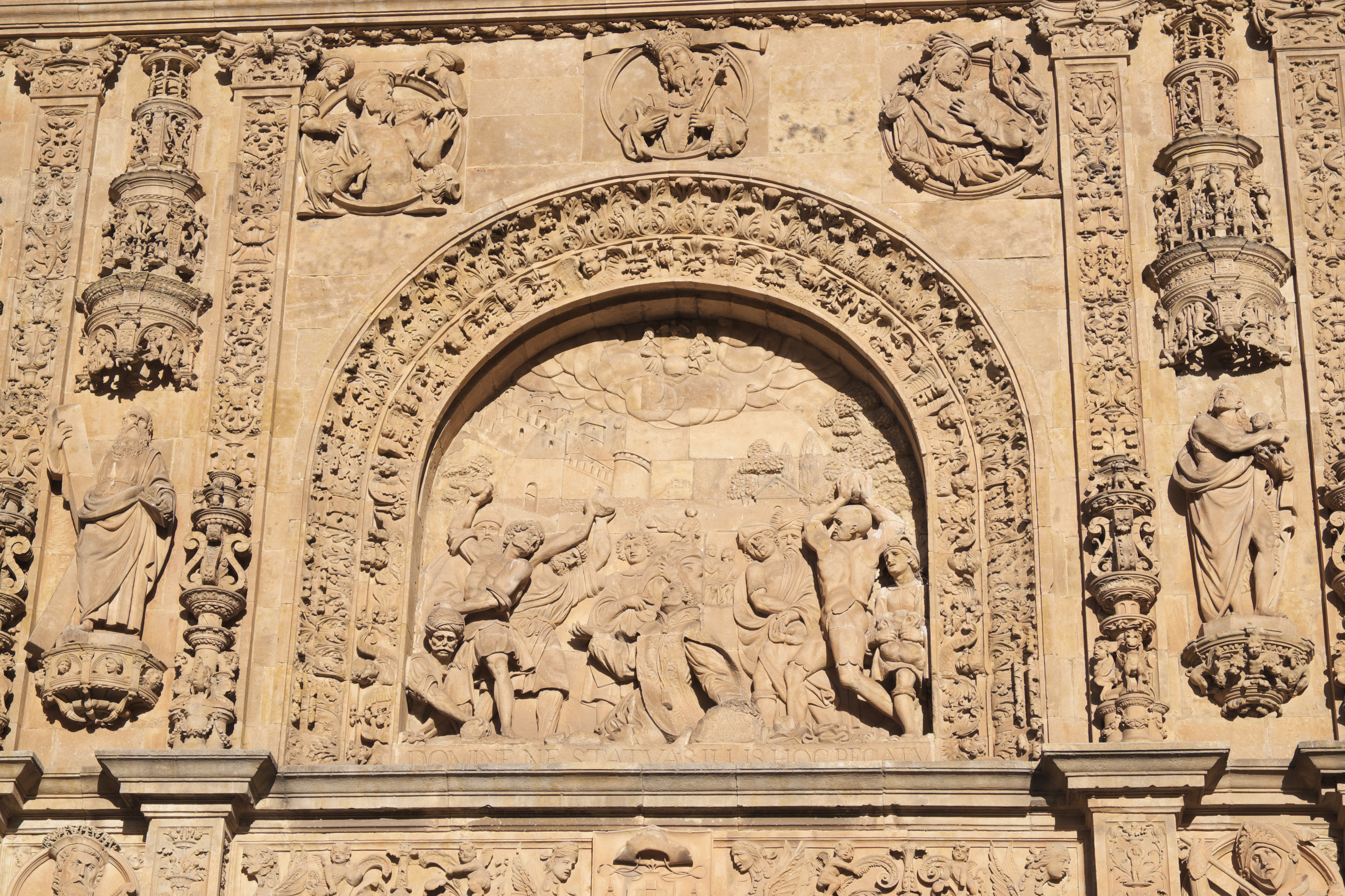 Kirche des Dominikanerklosters San Esteban in Salamanca (Kastilien-León/Spanien), Portalfassade, Relief über dem Portal, Darstellung: Steinigung des hl. Stephanus